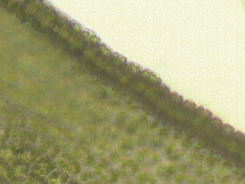 papillöse Laminazellen am Blattrand von Tortula ruralis, Rostock